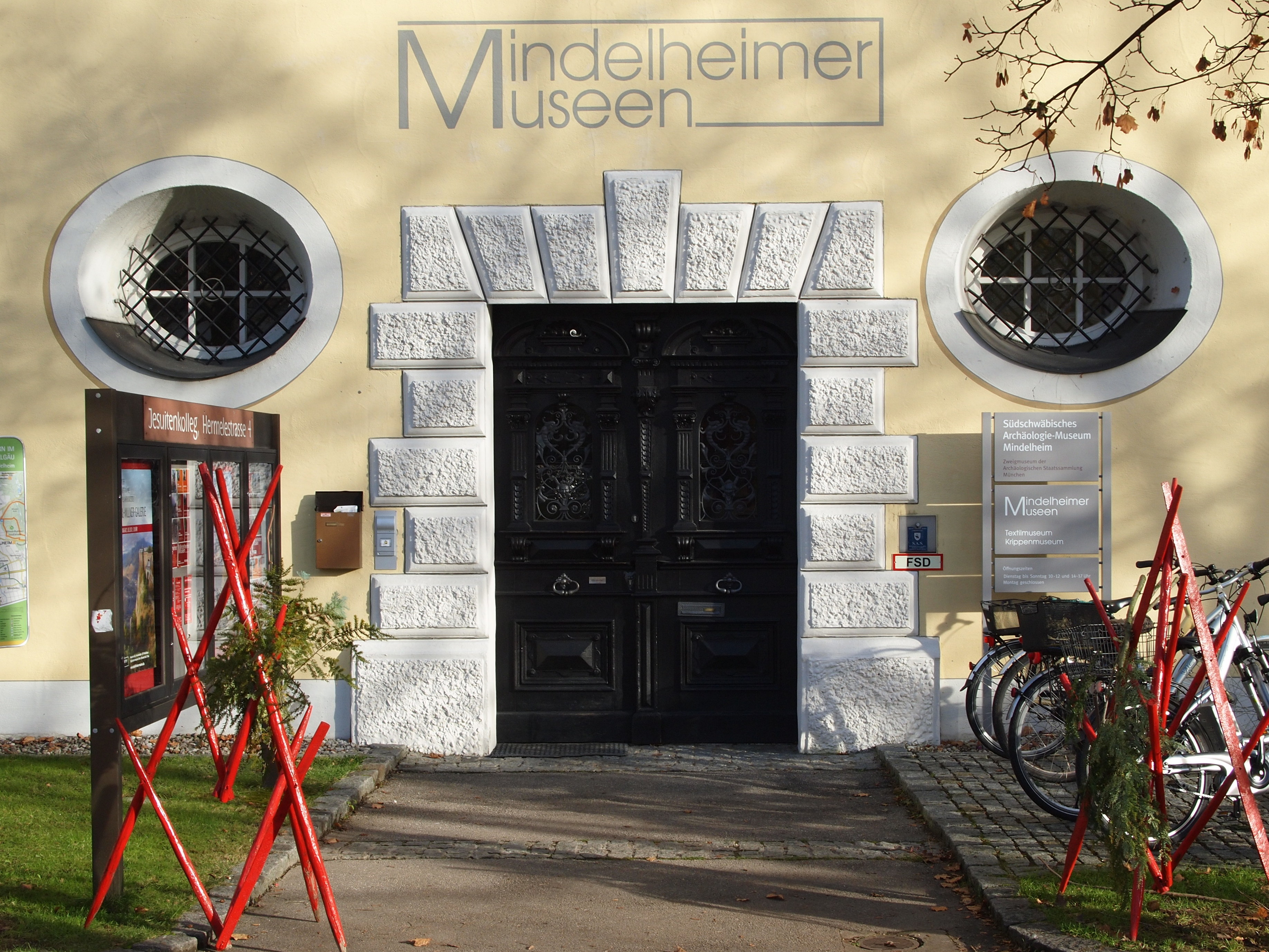 Mindelheim, Eingang Westflügel des ehem. Jesuitenkollegs, heute Mindelheimer Museen